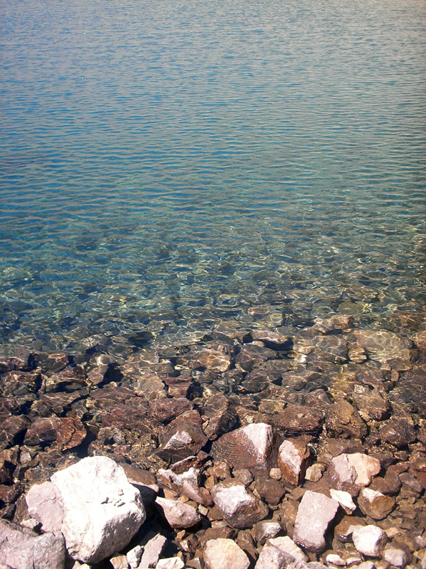 L'eau du lac du Combeynot (Hautes-Alpes). Cette eau est d'une transparence assez impressionante.